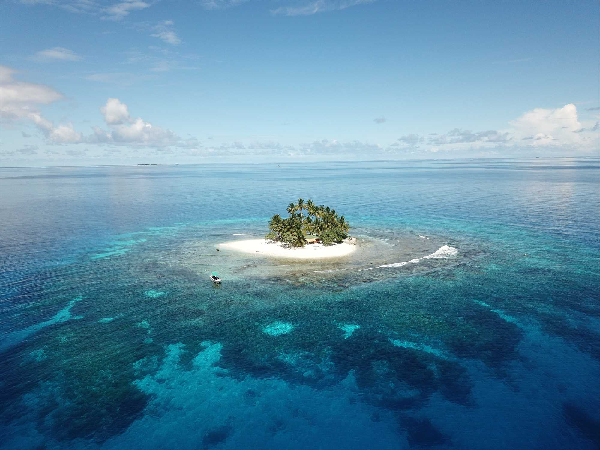 JEEP island